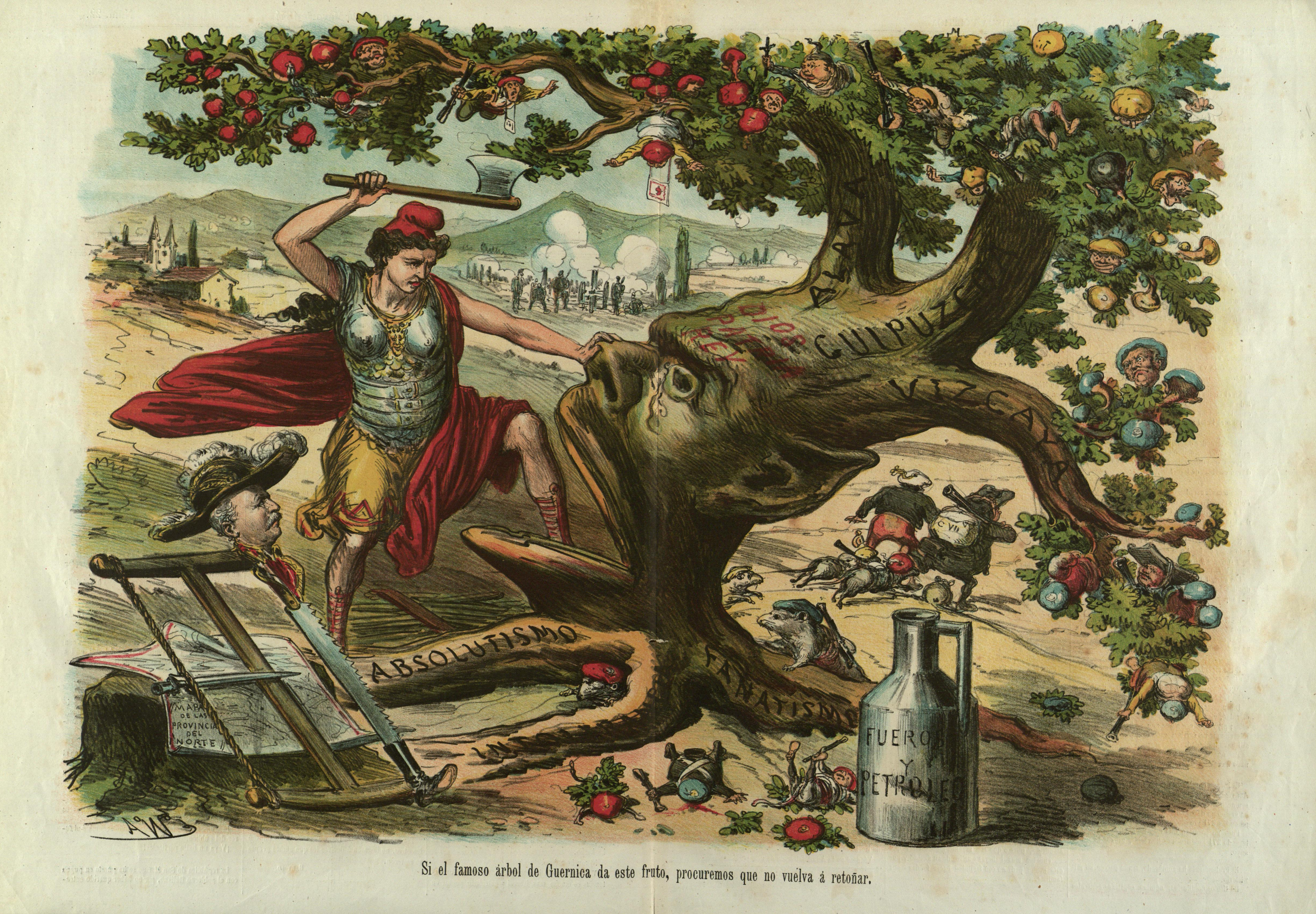 Si el famoso árbol de Guernica da este fruto, procuremos que no vuelva á retoñar.